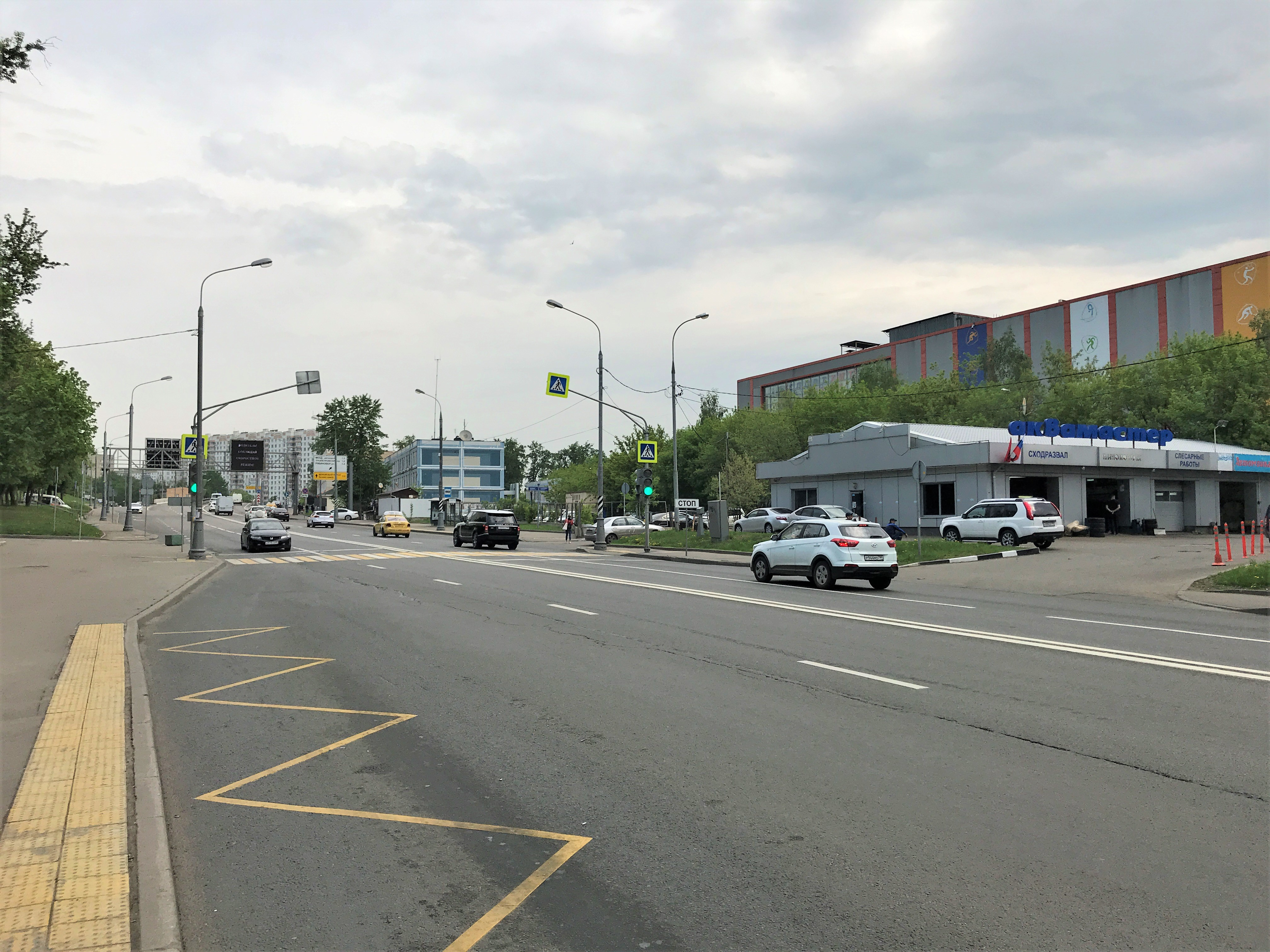 Сколковское ш. в Москве